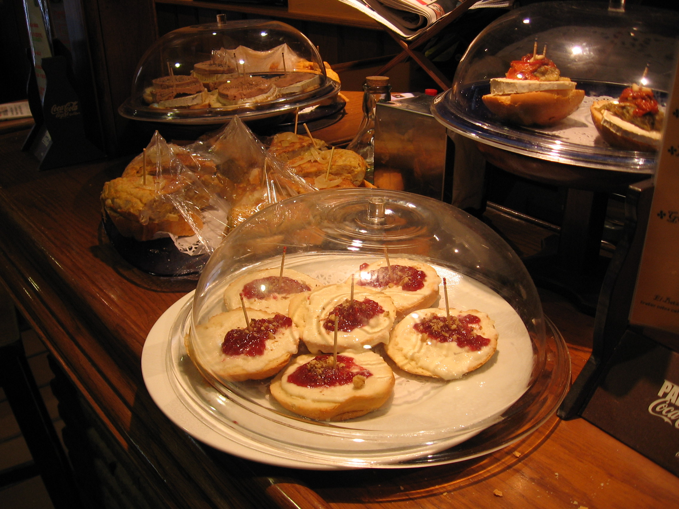 Pinchos en Laguardia, Álava (España)